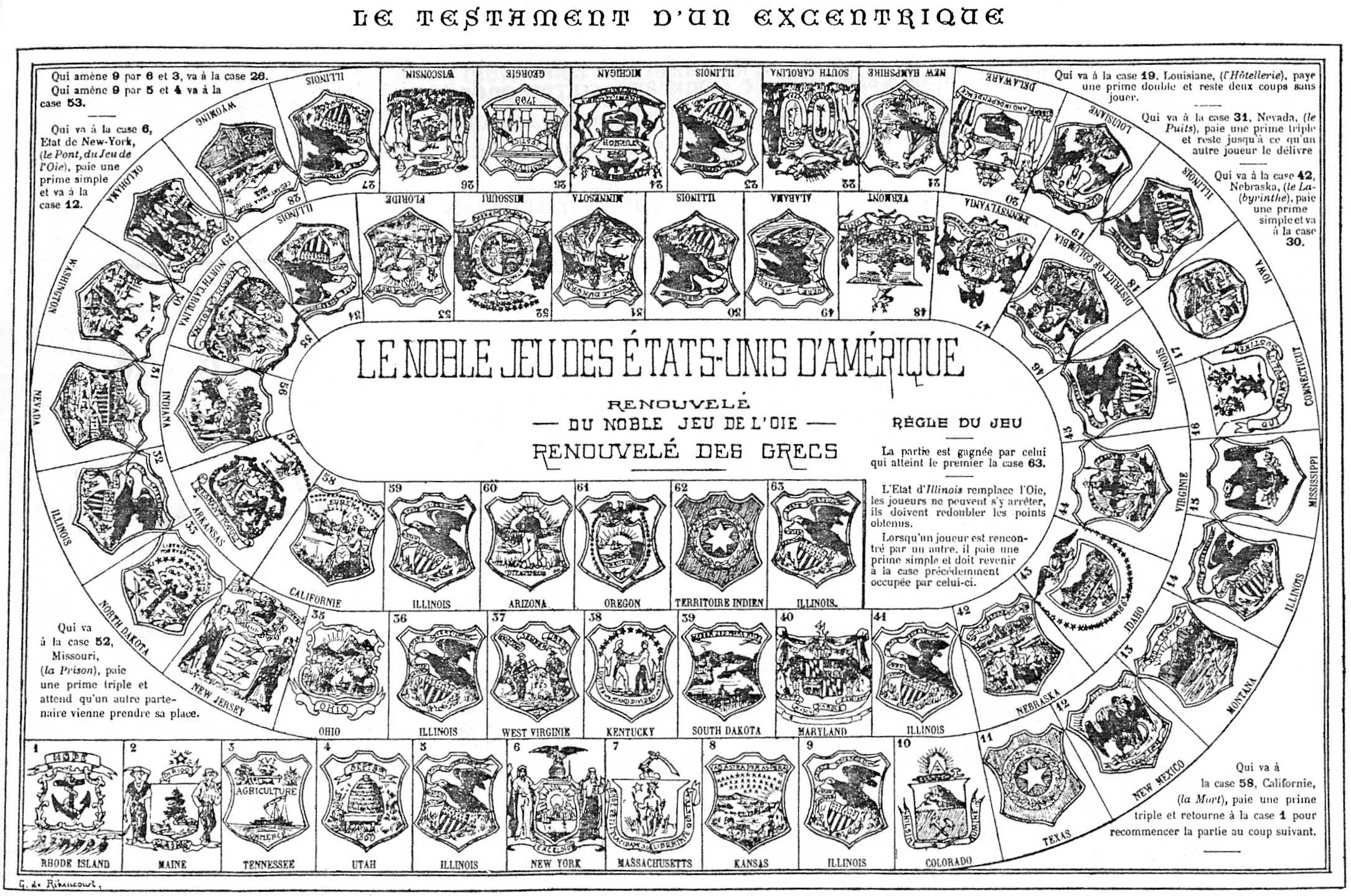 Mapa z původního vydání románu J. Verna, ilustrace Georga Rouxe. The original description page was here. All following user names refer to cs.wikipedia.